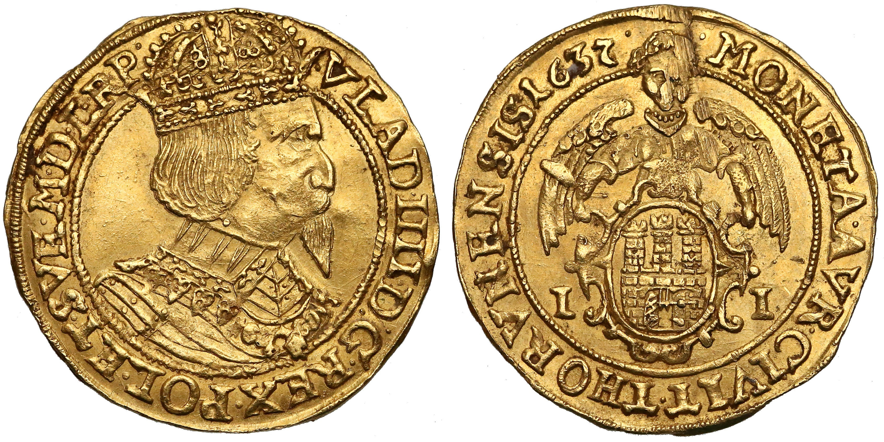 Dukat miejski Toruń 1637